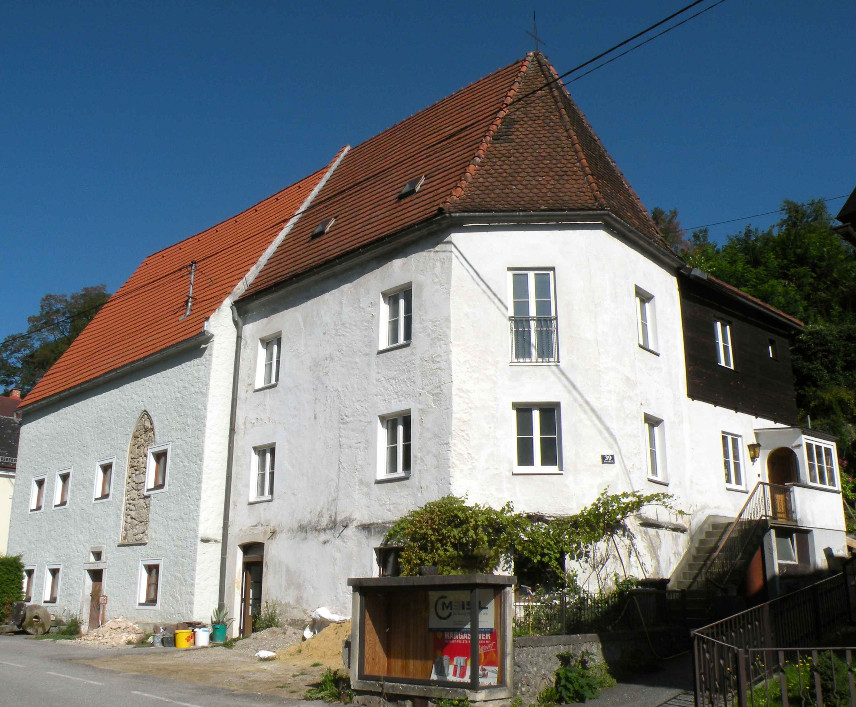 Ehemalige Marienkirche in Struden in Sankt Nikola an der Donau im Bezirk Perg in Oberösterreich